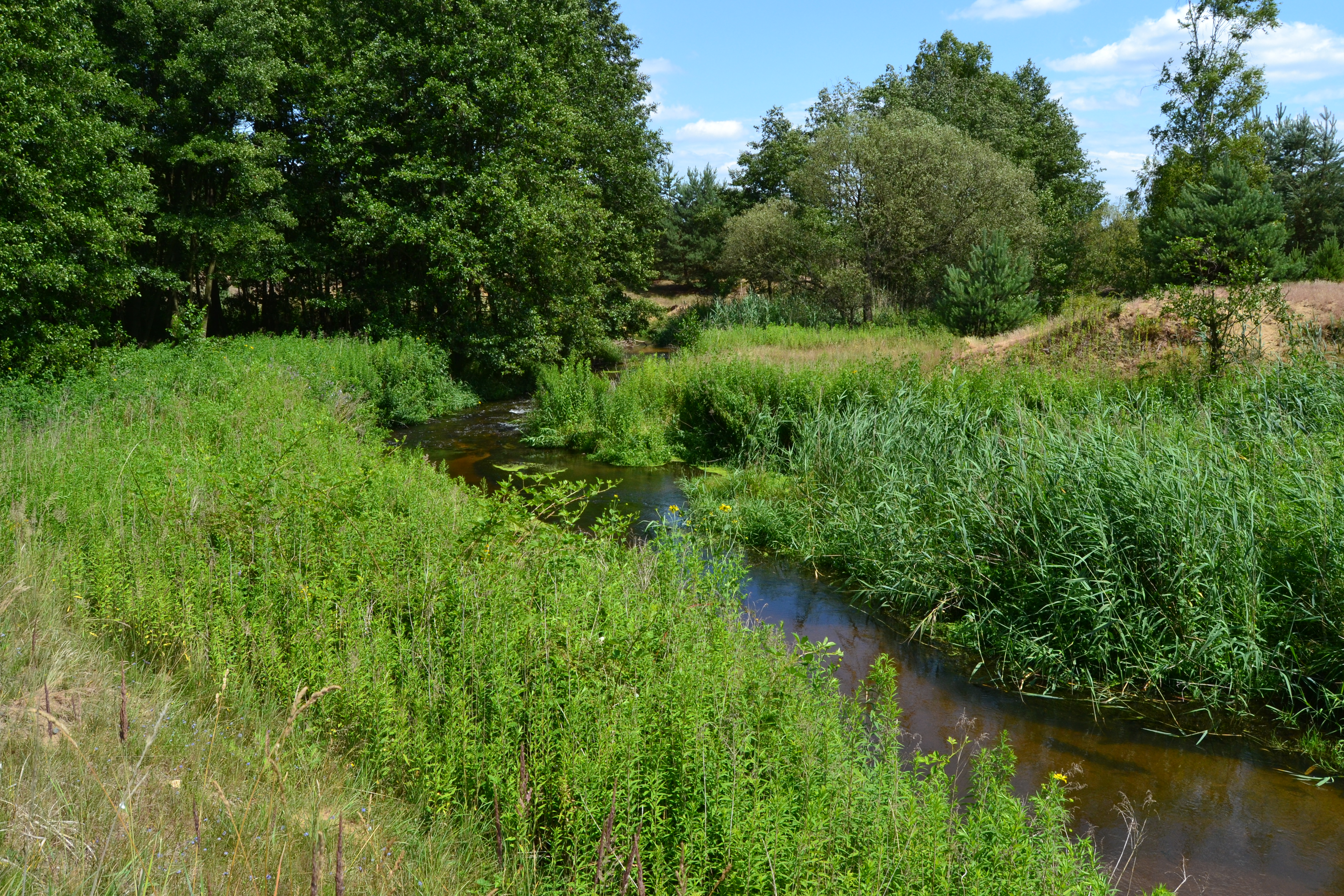 Aufnahme des 1996 gebrochenen Staudamms der Pulsnitz im Naturschutzgebiet Königsbrücker Heide. Dieser wurde von der Sowjetarmee errichtet um im angestauten Gewässer Unterwasserfahrten zu üben.